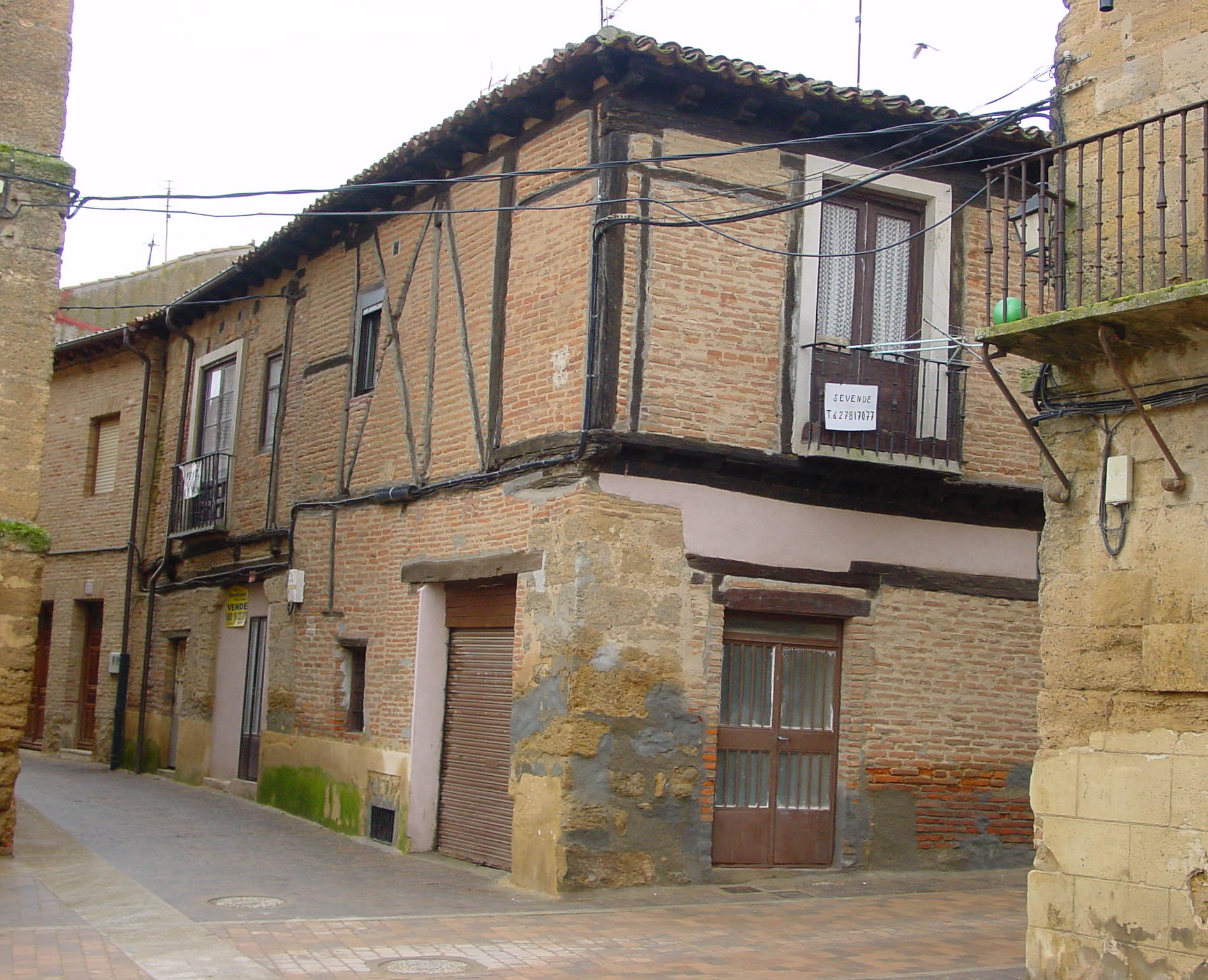 Valderas (León, España). La casa más antigua del pueblo, junto al antiguo Ayuntamiento.